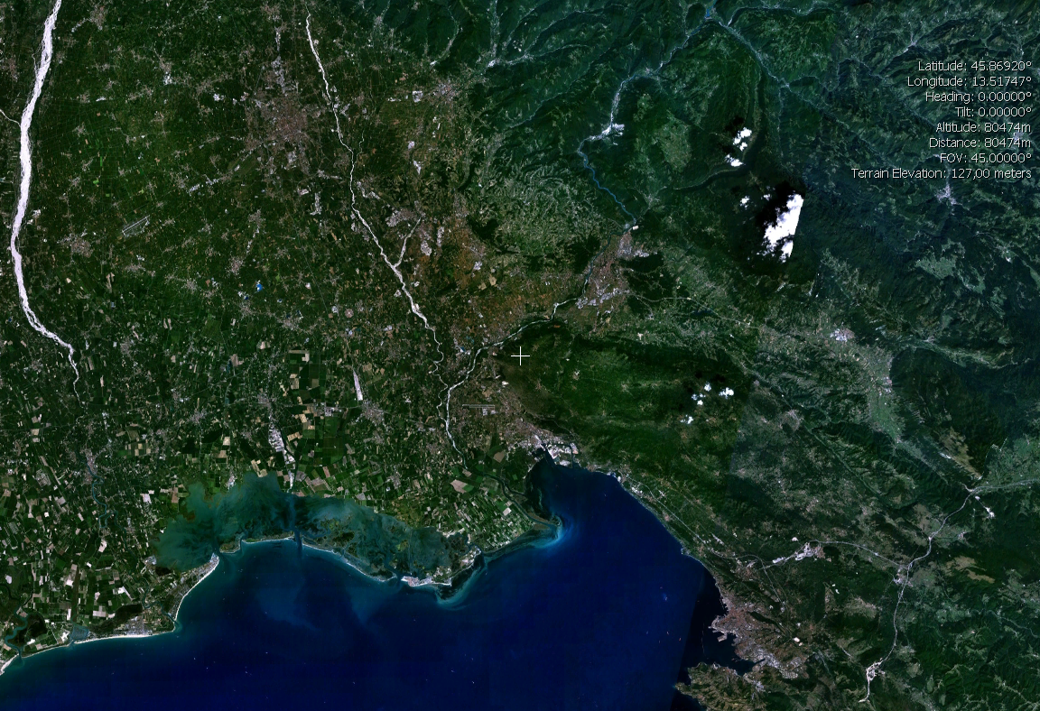 Friuli-Venezia Giulia, an Italian region, from satellite